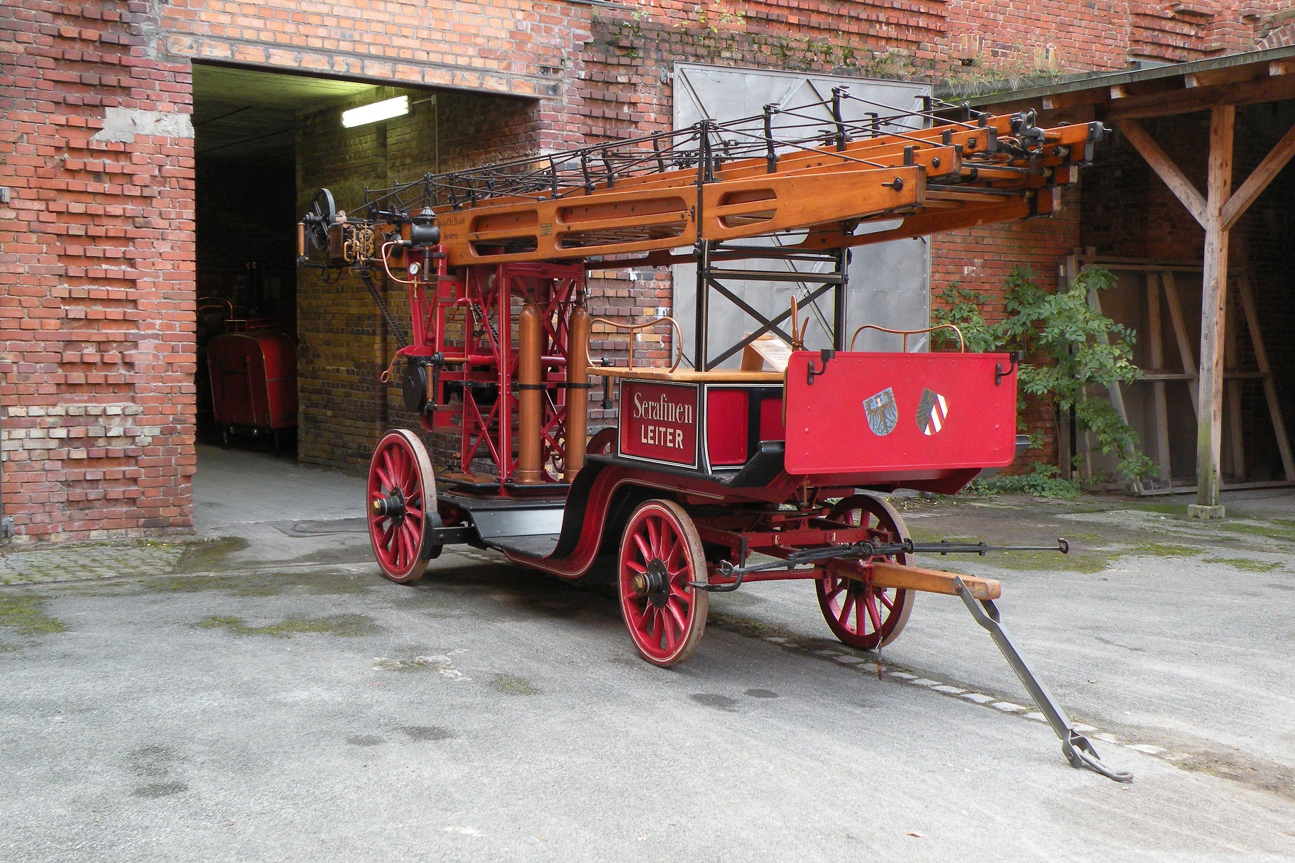 Serafinen-Leiter von Justus Christian Braun